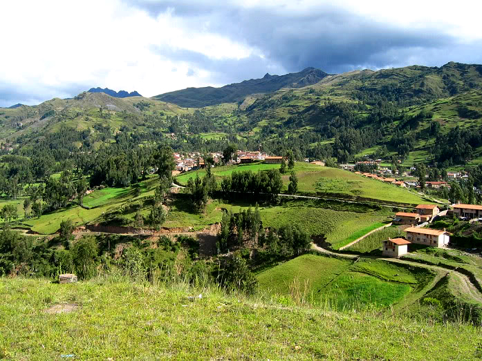 Se caracteriza por presentar superficies de forma ondulada, de altura variable y localizada principalmente en los pisos altitudinales más elevados. Comprende colinas suaves a moderadamente empinadas, de relativos usos agrícolas y dedicados mayormente al pastoreo. Caracterización que corresponde al Distrito de Chacas.